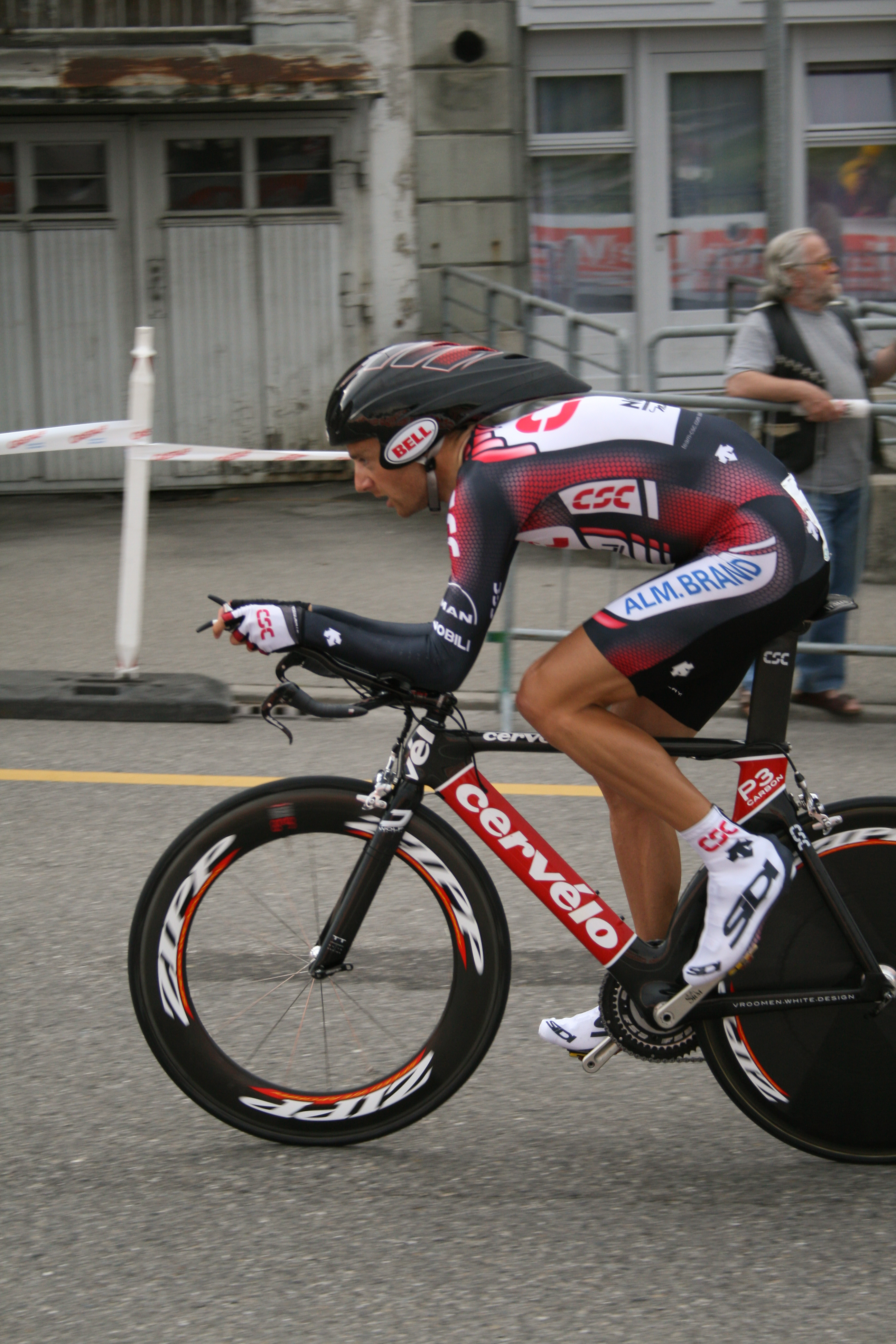 Karsten Kroon prologue du Tour de Romandie 2007